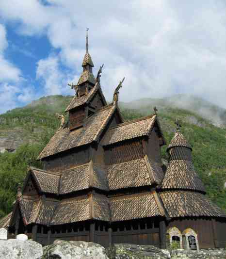 Stabkirche von Borgund